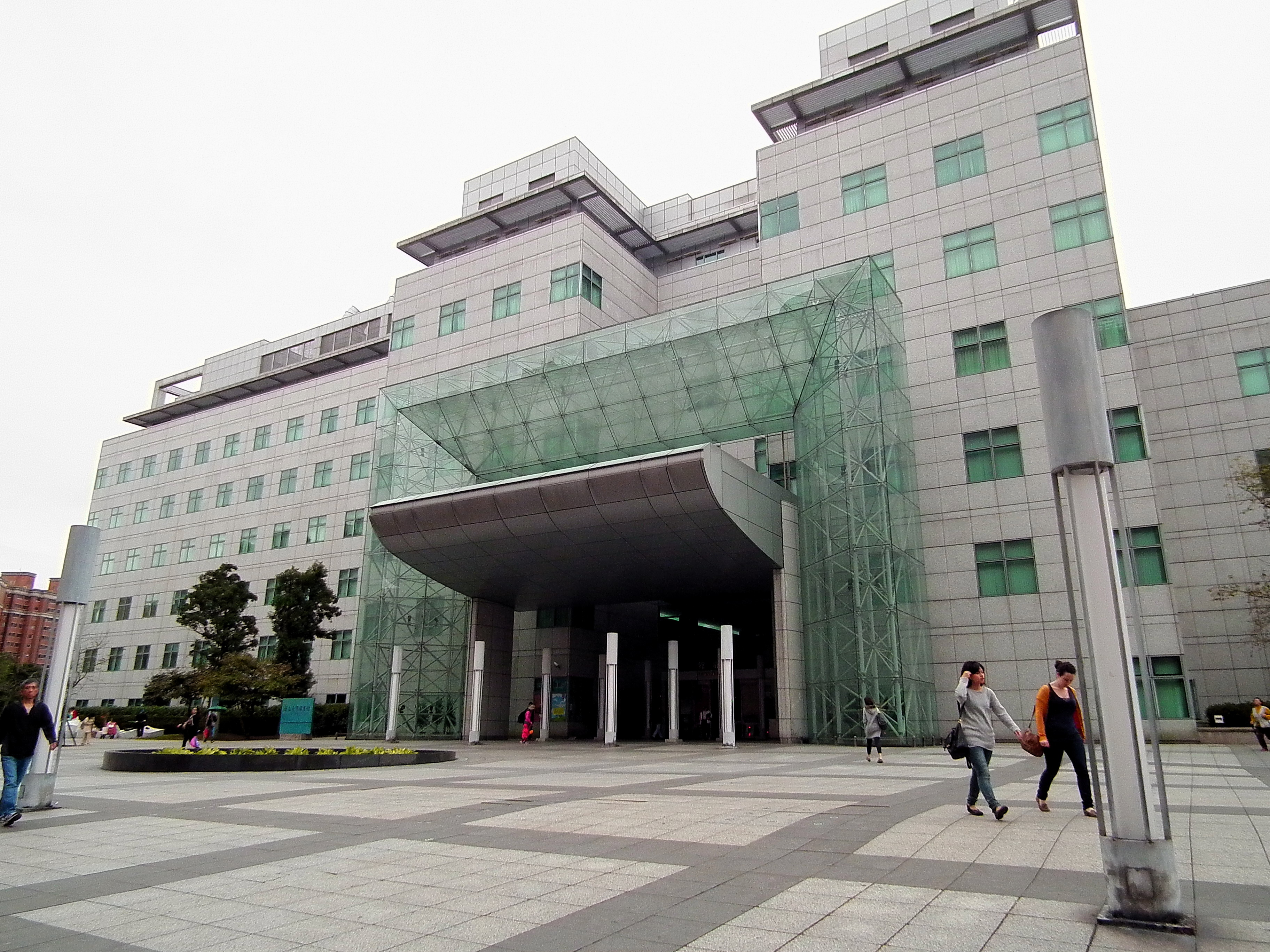 中文（台灣）: 國立臺灣圖書館。